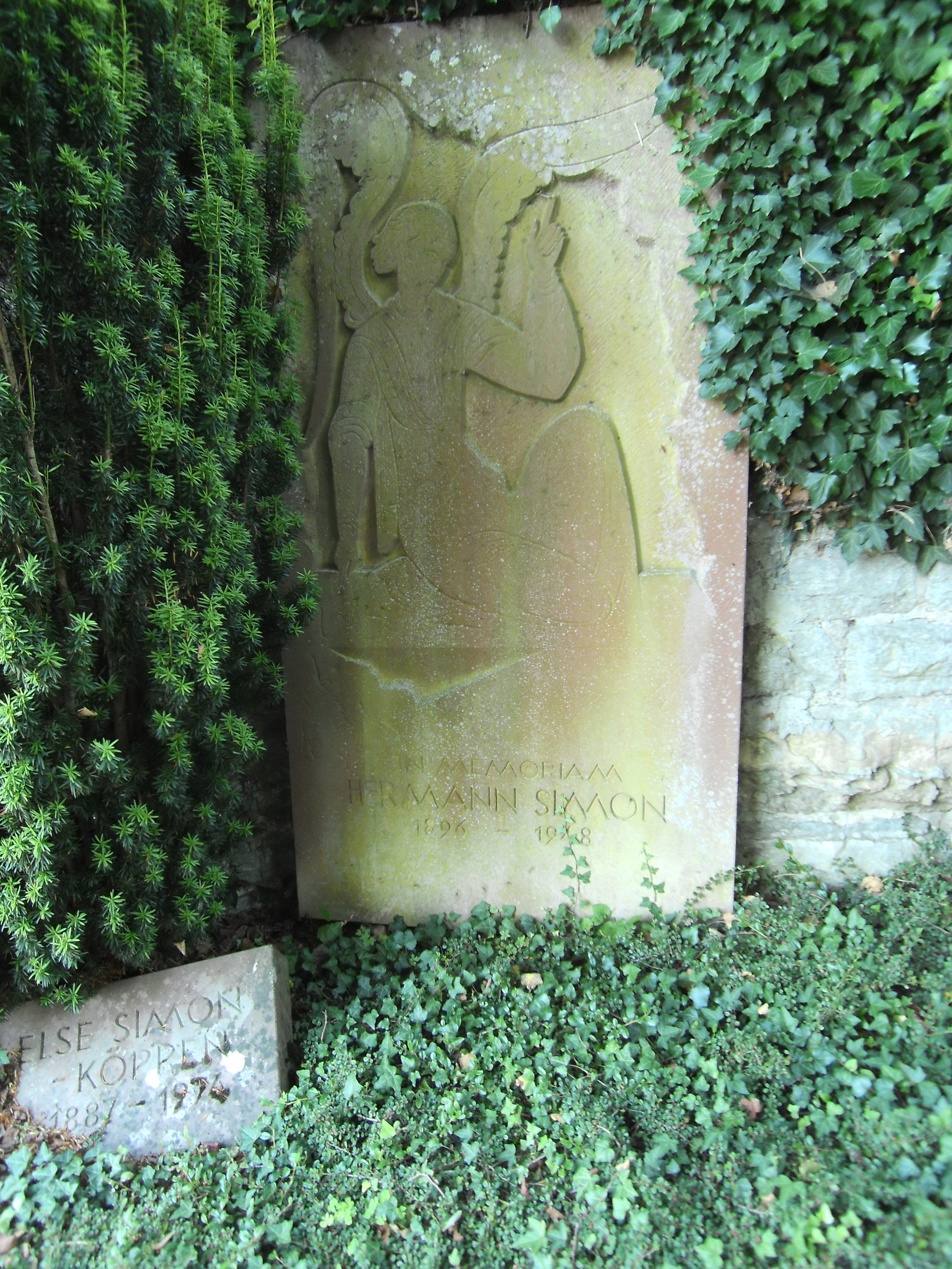 Grab von Hermann Simon und Else Simon in Waldshut-Tiengen, (in Tiengen), Grabplatte entworfen von Ruth Schaumann.